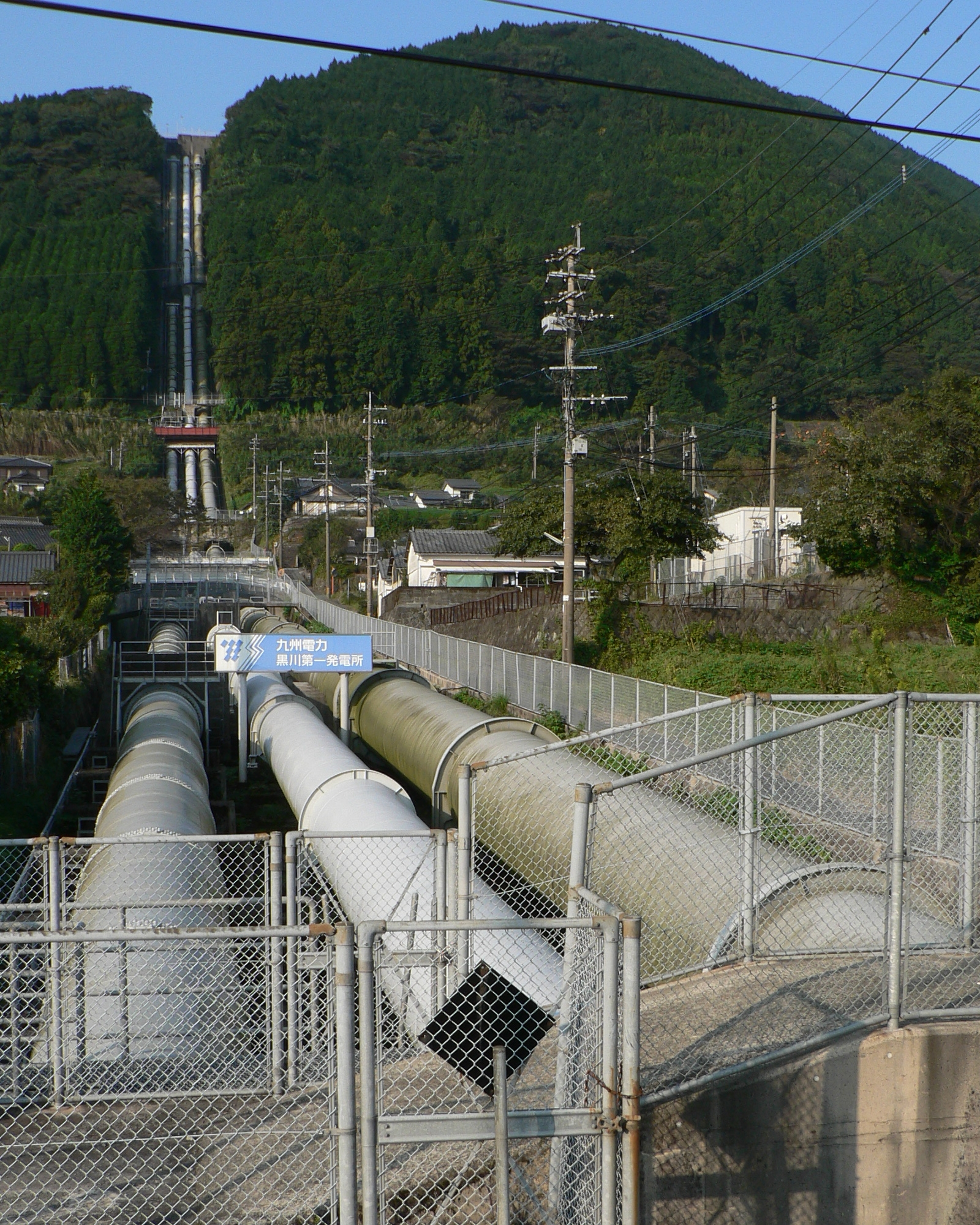 九州電力黒川第一発電所。熊本県初の水力発電所で、1914年に熊本電気の黒川発電所として完成・運転開始。最大出力42,200キロワット。